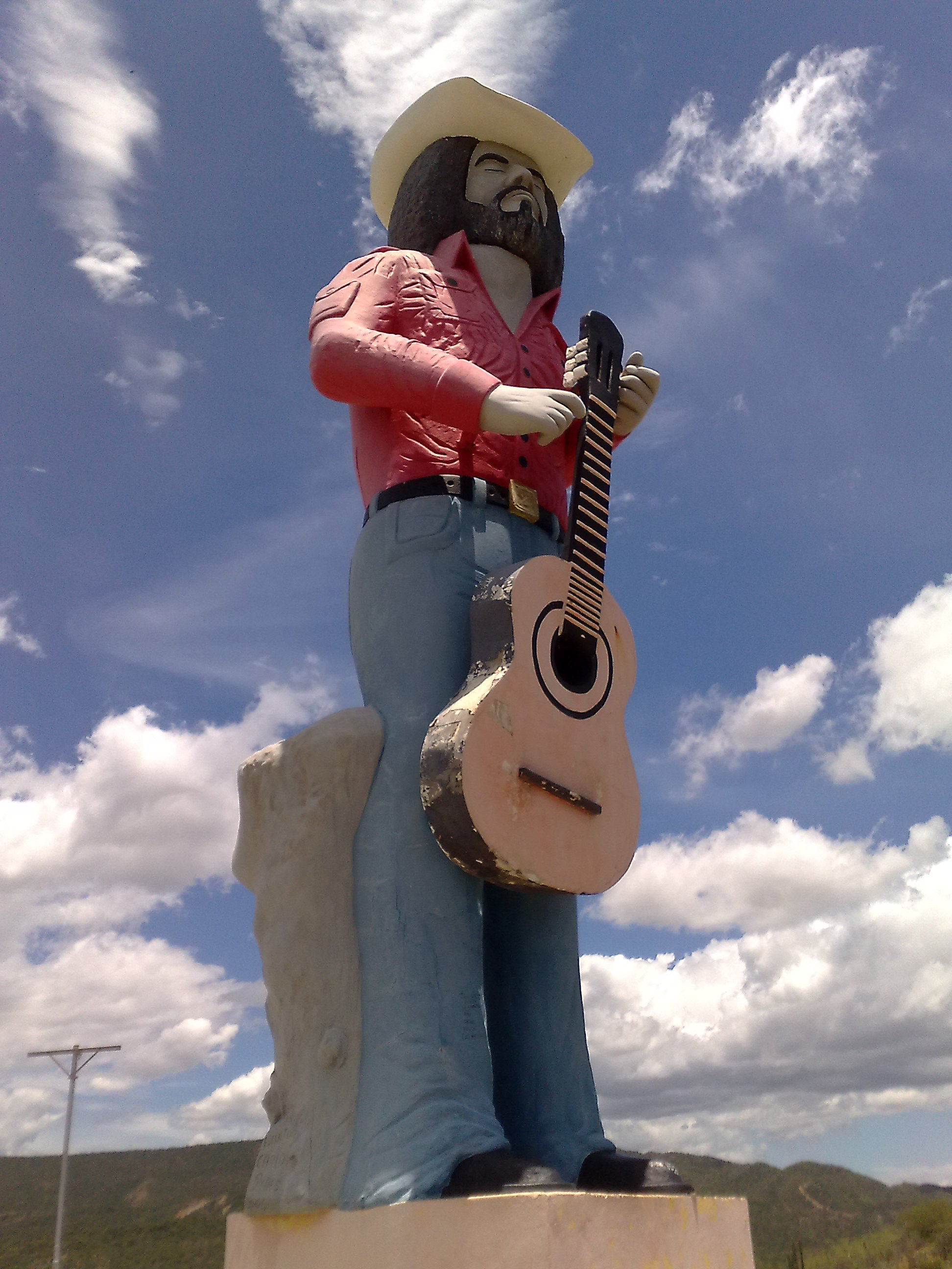 Monumento en honor a Alí Primera en Caujarao, Estado Falcón.